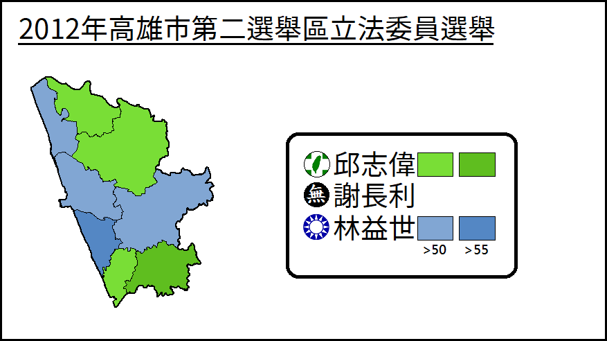 2012年高雄市第二選舉區立法委員選舉得票